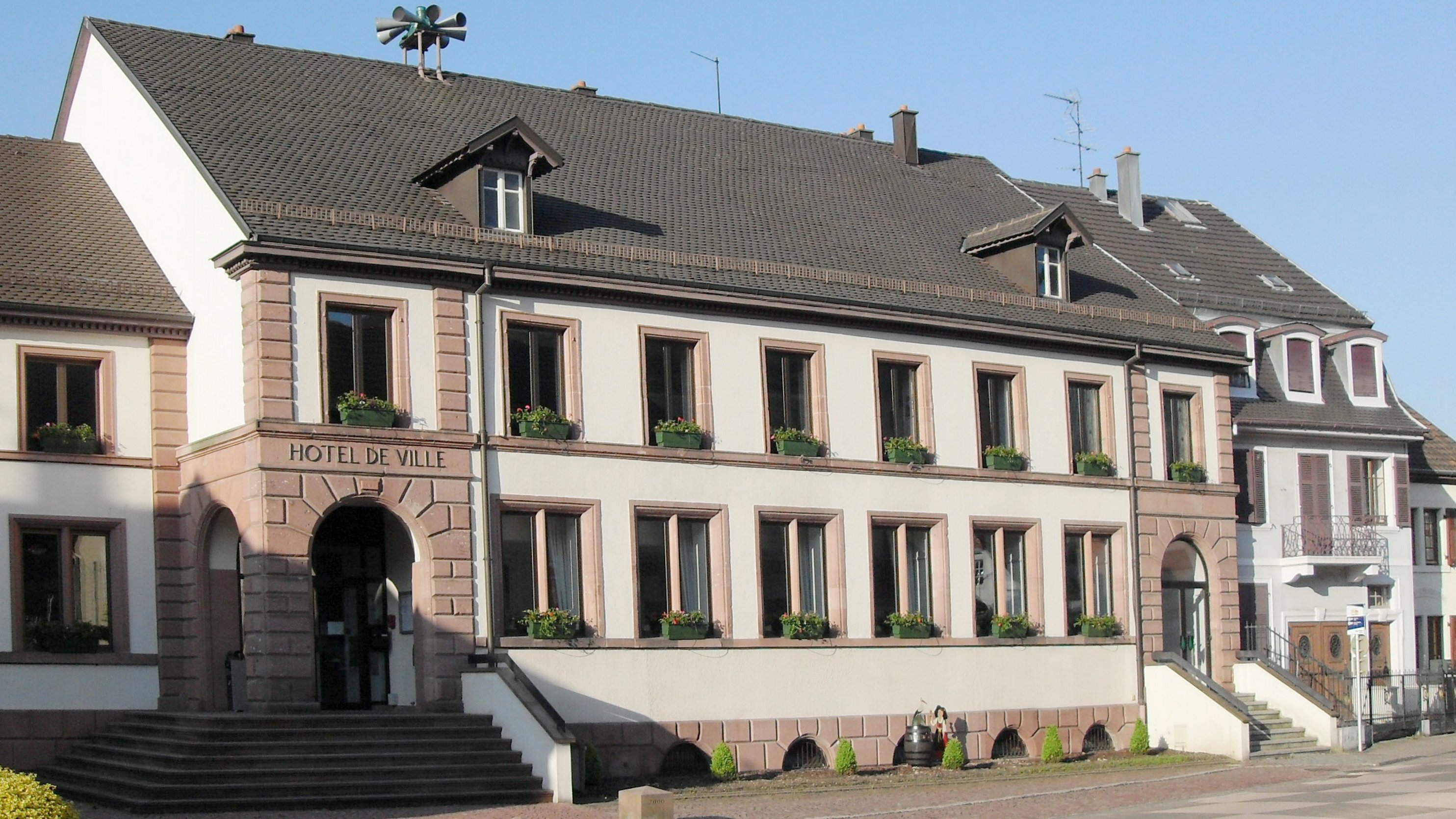 L'hôtel de ville de Vieux-Thann